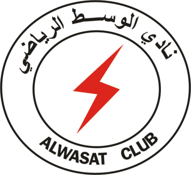 رمز نادي كهرباء الوسط الرياضي